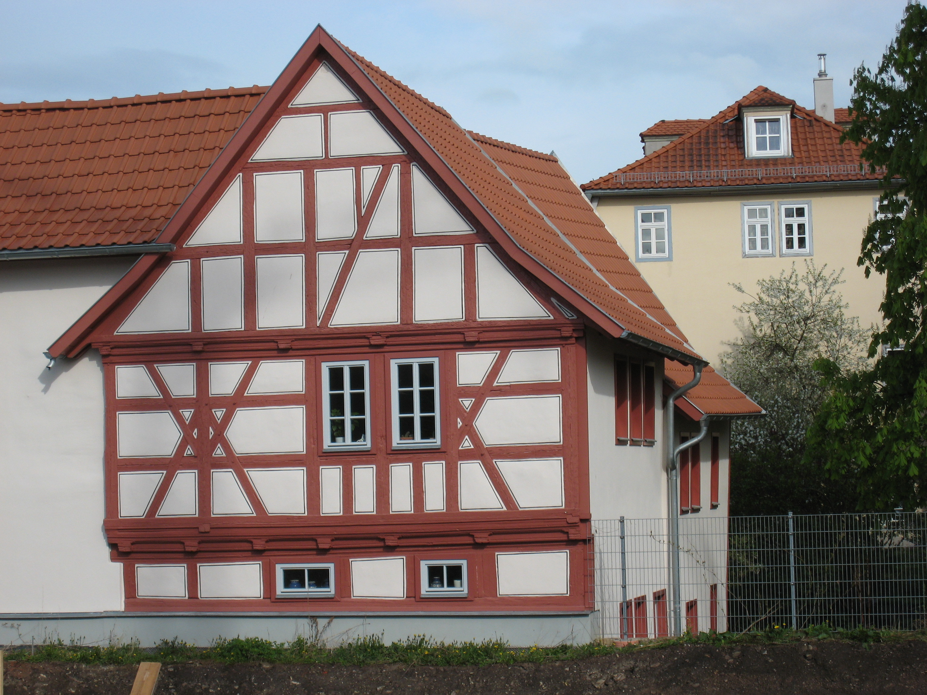 Gerberhaus Längwitzer Straße 3 in Arnstadt